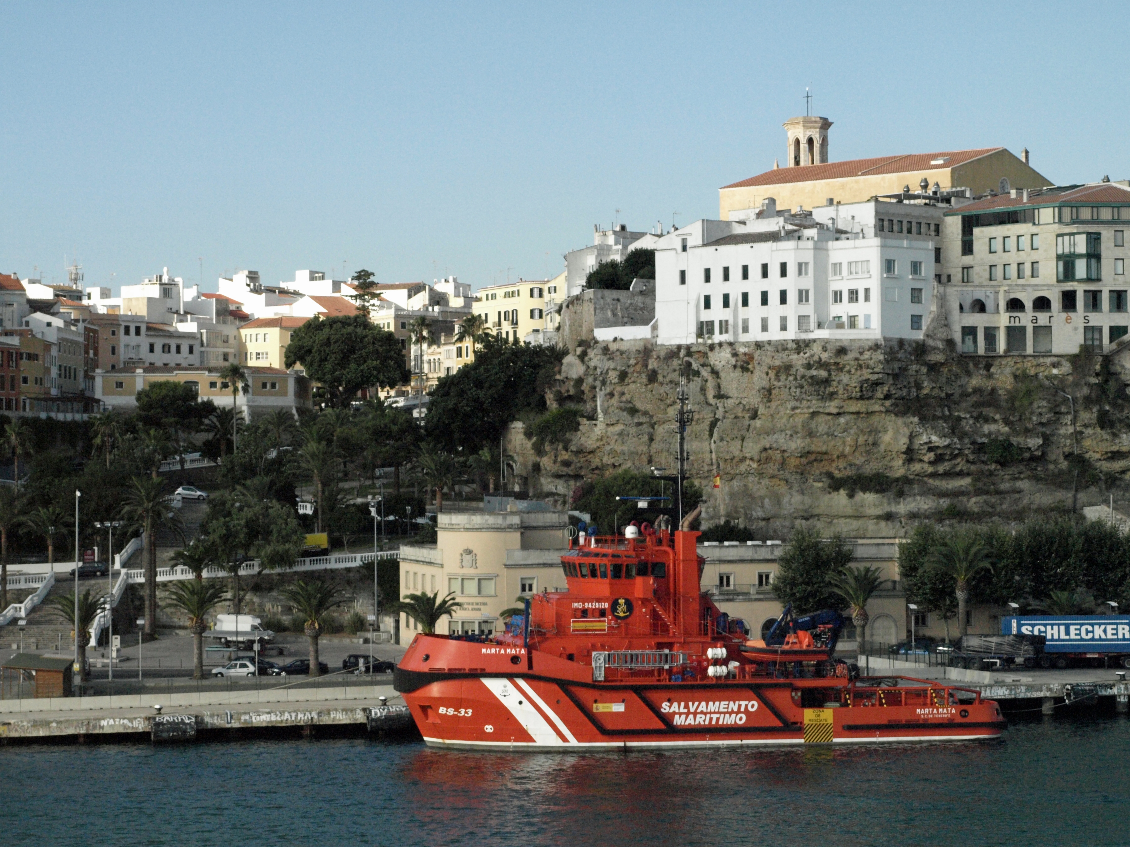 SASEMAR 3